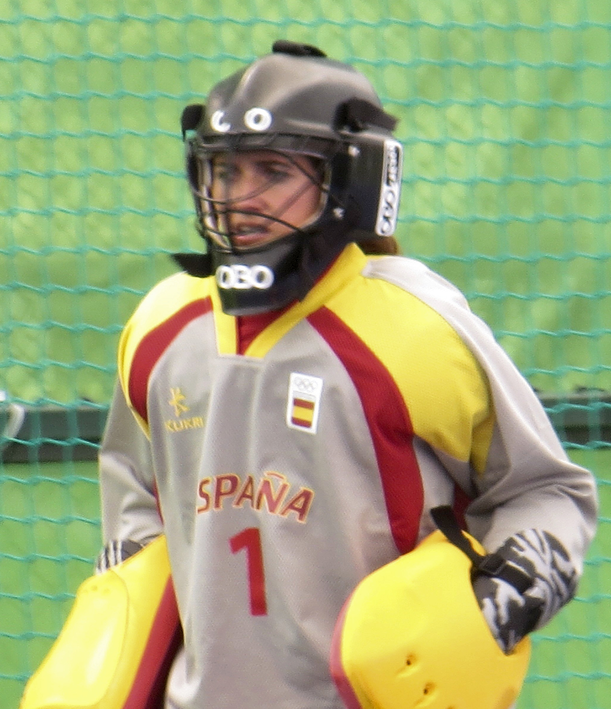 Rio 2016.Hóquei na grama. Feminino. Holanda x Espanha. sx 80